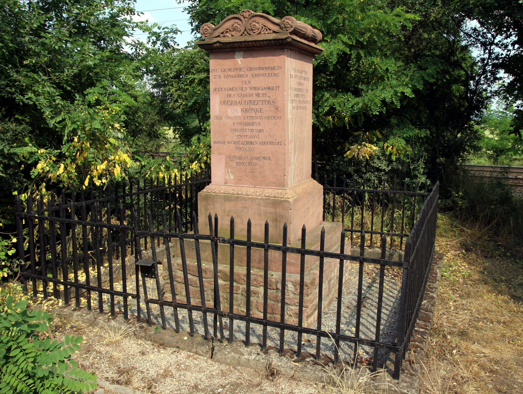 Das Denkmal für Claus Kröncke zwischen Groß-Rohrheim und Gernsheim.